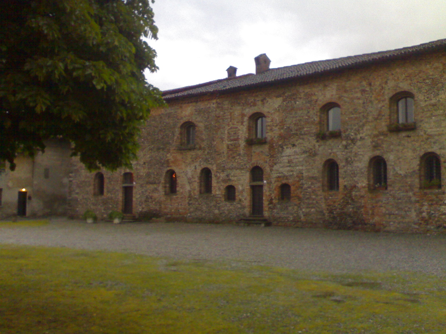 Corneliano, Castello Borromeo. Epoca di costruzione: sec. XIV - sec. XVI. Muratura in mattoni e ciottoli posate a spina di pesce